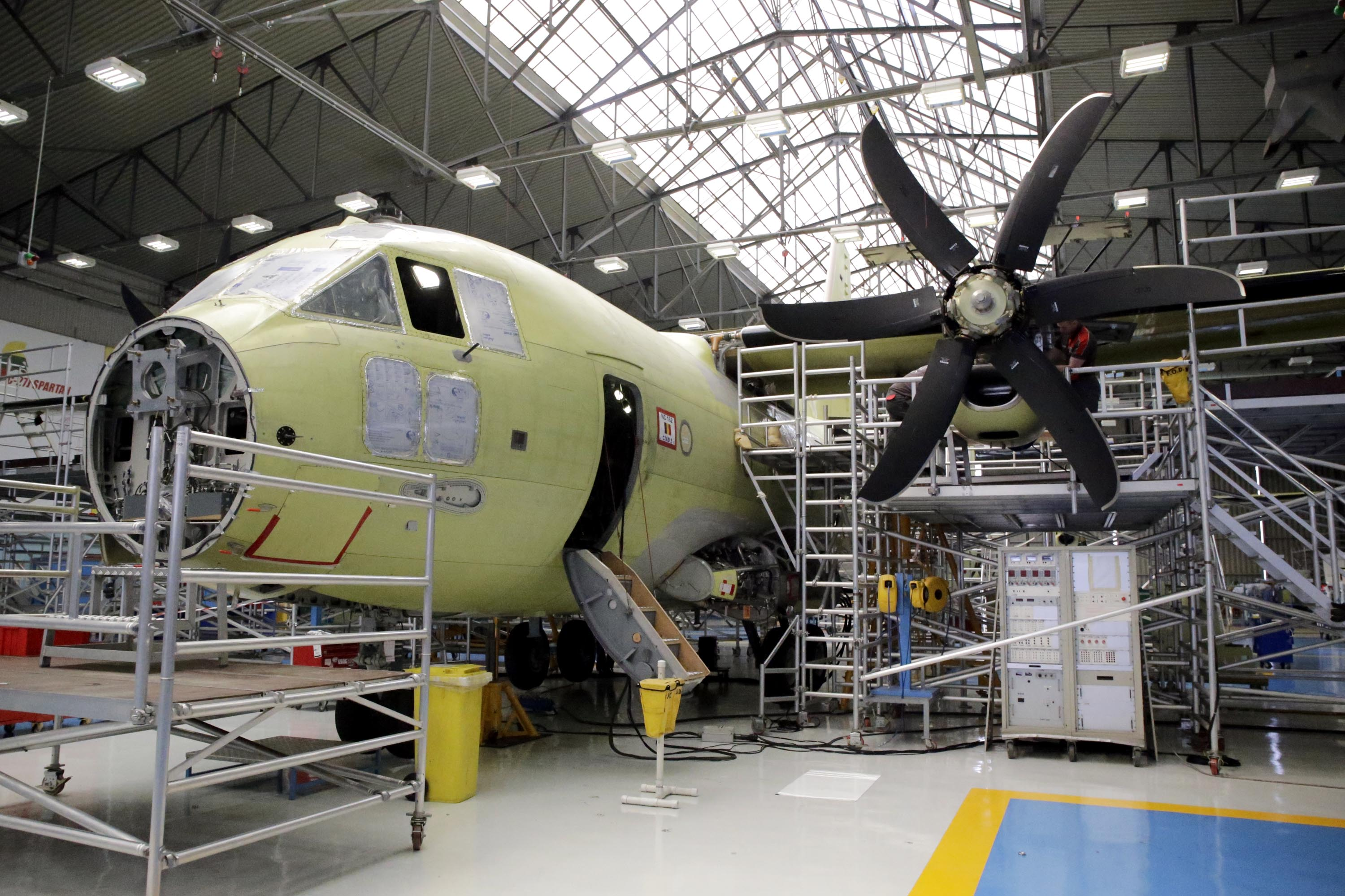 En el marco de su visita oficial a Italia, el ministro de Defensa, Pedro Cateriano Bellido, acompañado del Comandante General de la Fuerza Aérea, General del Aire Jaime Figueroa Olivos, sostuvo reuniones con autoridades del ministerio de Defensa de ese país. El titular del sector también participó en audiencias con agregados militares de nuestro país y representantes de la empresa italiana Alenia Aermacchi, que proveerá a la Fuerza Aérea de dos modernos aviones de transporte C-27J. El ministro y su comitiva realizaron una visita guiada a la línea de producción de dicha empresa, donde pudieron observar el ensamblaje del primer avión C-27J para el Estado Peruano. Finalmente, el ministro Cateriano abordó un avión de este tipo perteneciente a la Fuerza Aérea Romana donde experimentó la potencia, capacidad y versatilidad de dicha nave.